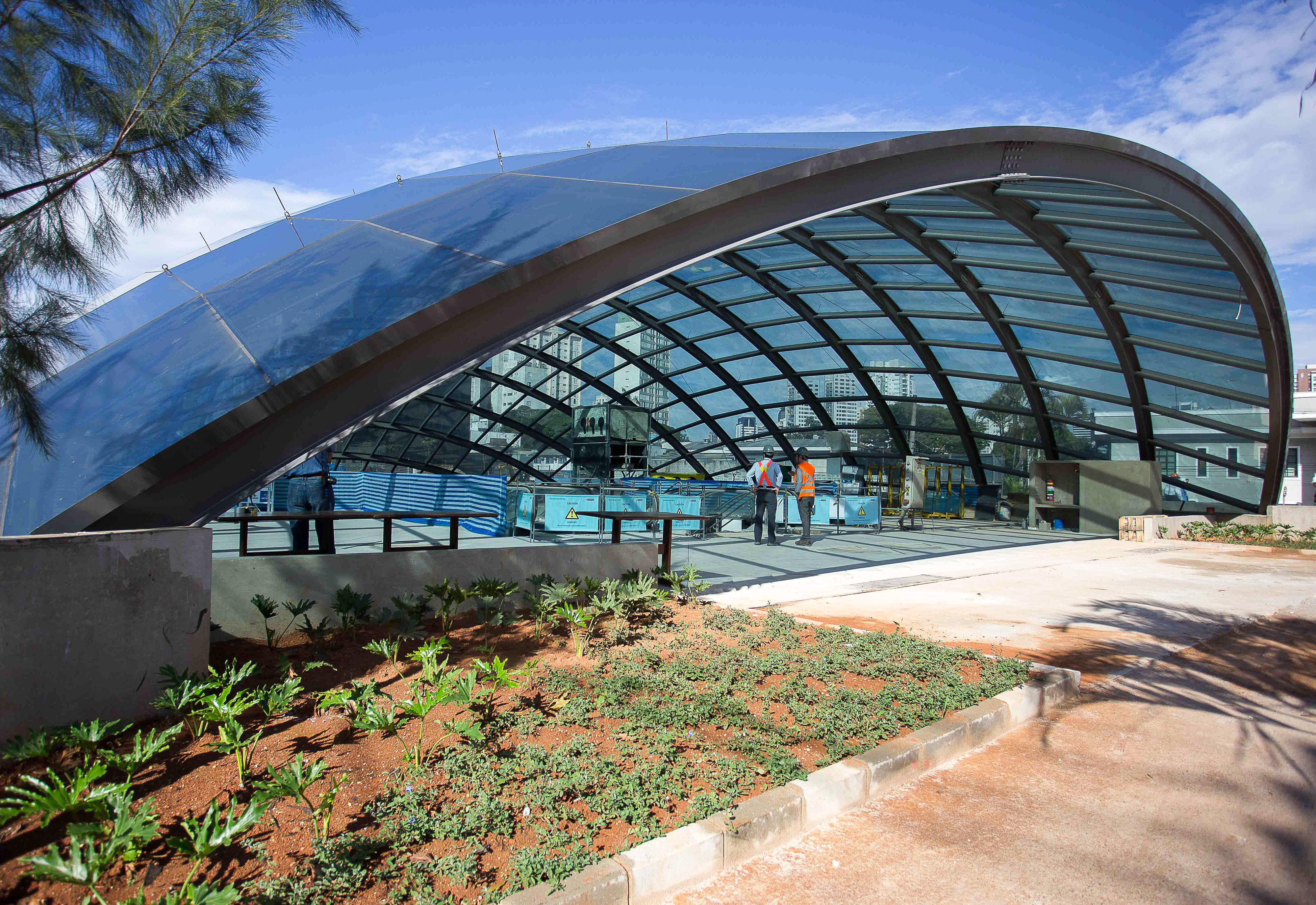 Neste sábado, 4, Geraldo Alckmin vistoriou as obras da nova estação, que deve receber 29,4 mil passageiros por dia.